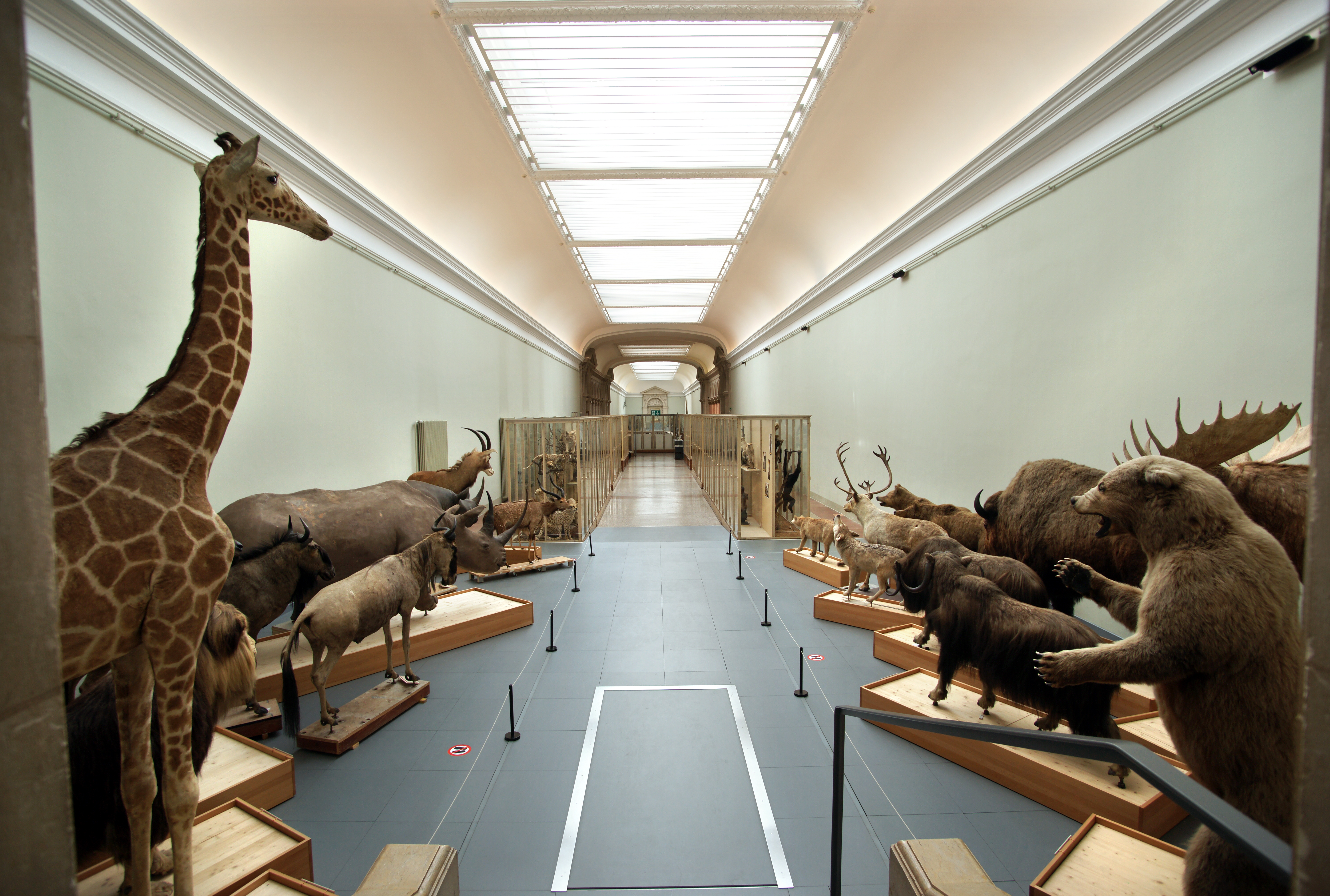 Palazzo di Rumine The making of this document was supported by Wikimedia CH. (Submit your project!) For all the files concerned, please see the category Supported by Wikimedia CH.